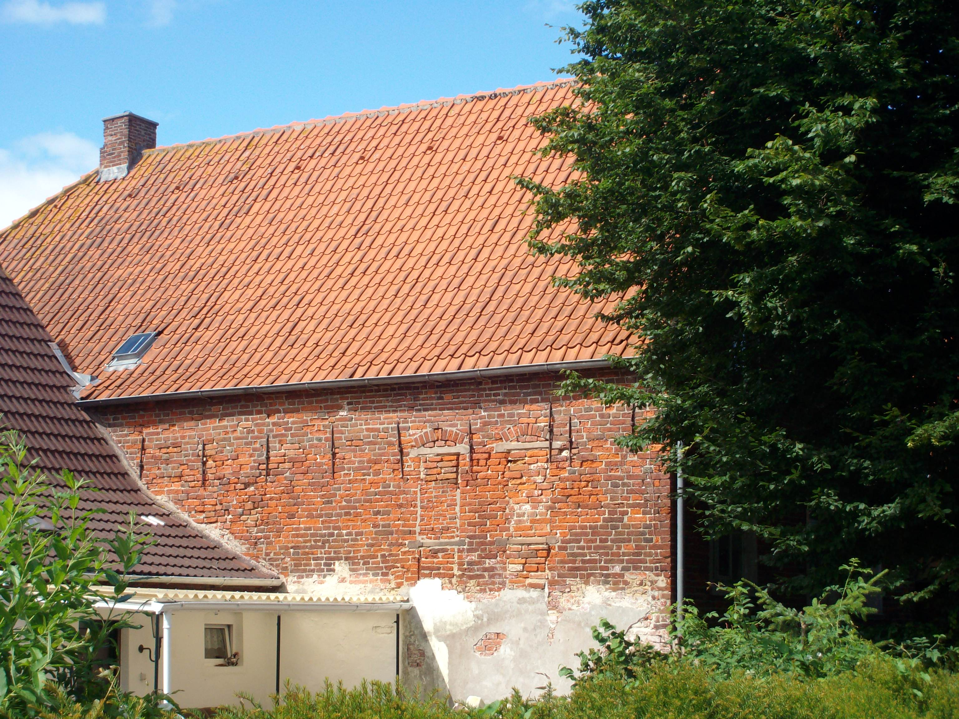 Ostseite des Albahauses in Jemgum, Ostfriesland